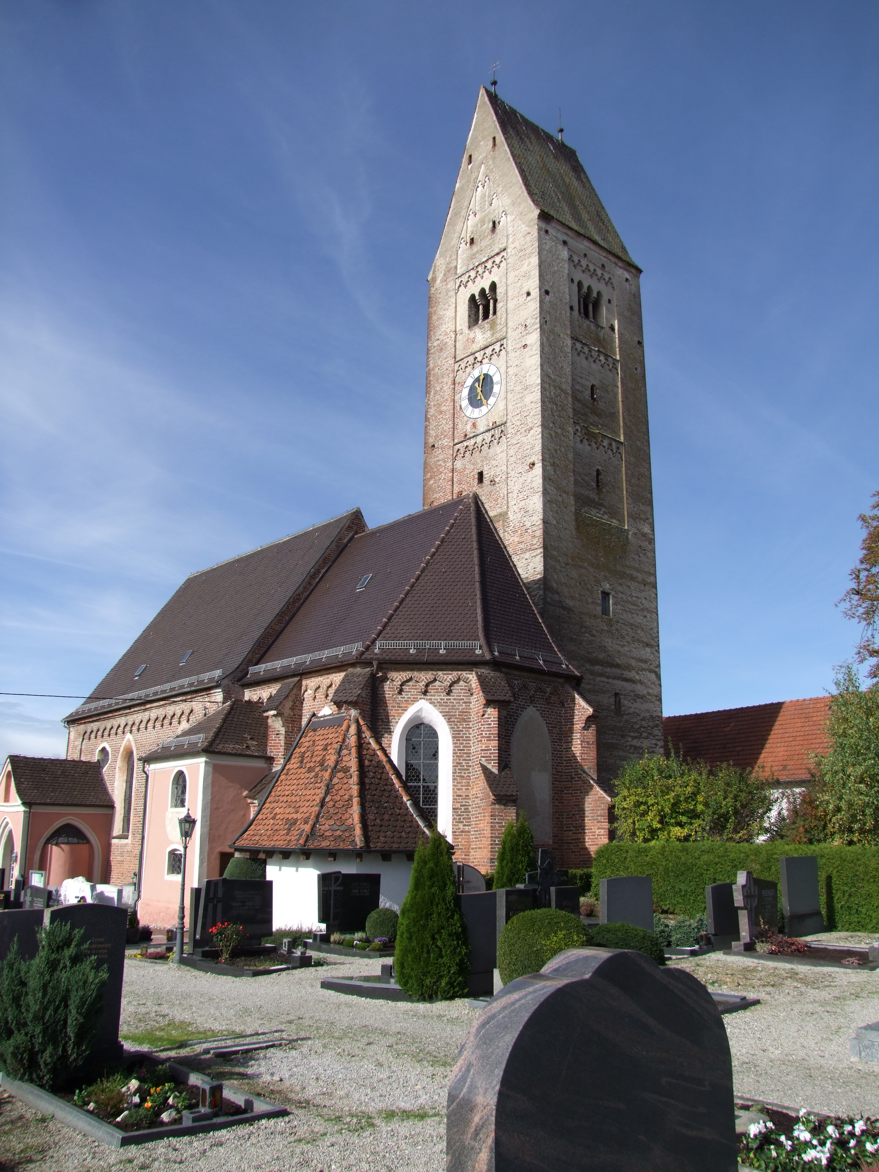 St. Bartholomäus im oberschwäbischen Apfeltrach in Bayerisch/Schwaben